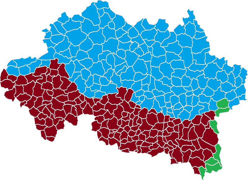 Carte linguistique de l'Allier. Bleu : Bourbonnais : oïl/français, Rouge : occitan du Croissant (rouge clair : marchois, rouge foncé : arverno-bourbonnais), Vert : francopronvençal.